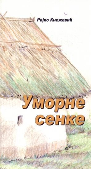 Umorne senke; autor Rajko Knežević, urednik Jovan Nedić, Beli Manastir, Vijeće srpske nacionalne manjine u Gradu Belom Manastiru, 2007; ISBN 978-953-95969-1-8